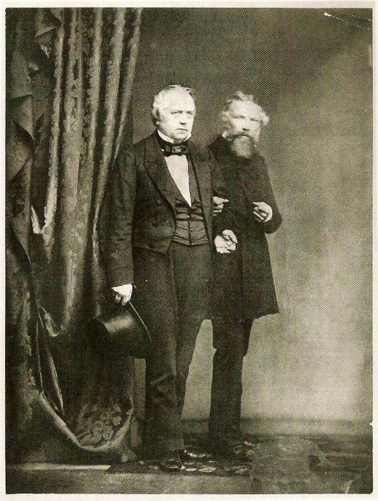 Gammelt foto af D.G. Monrad og Constantin Hansen fra ca 1860